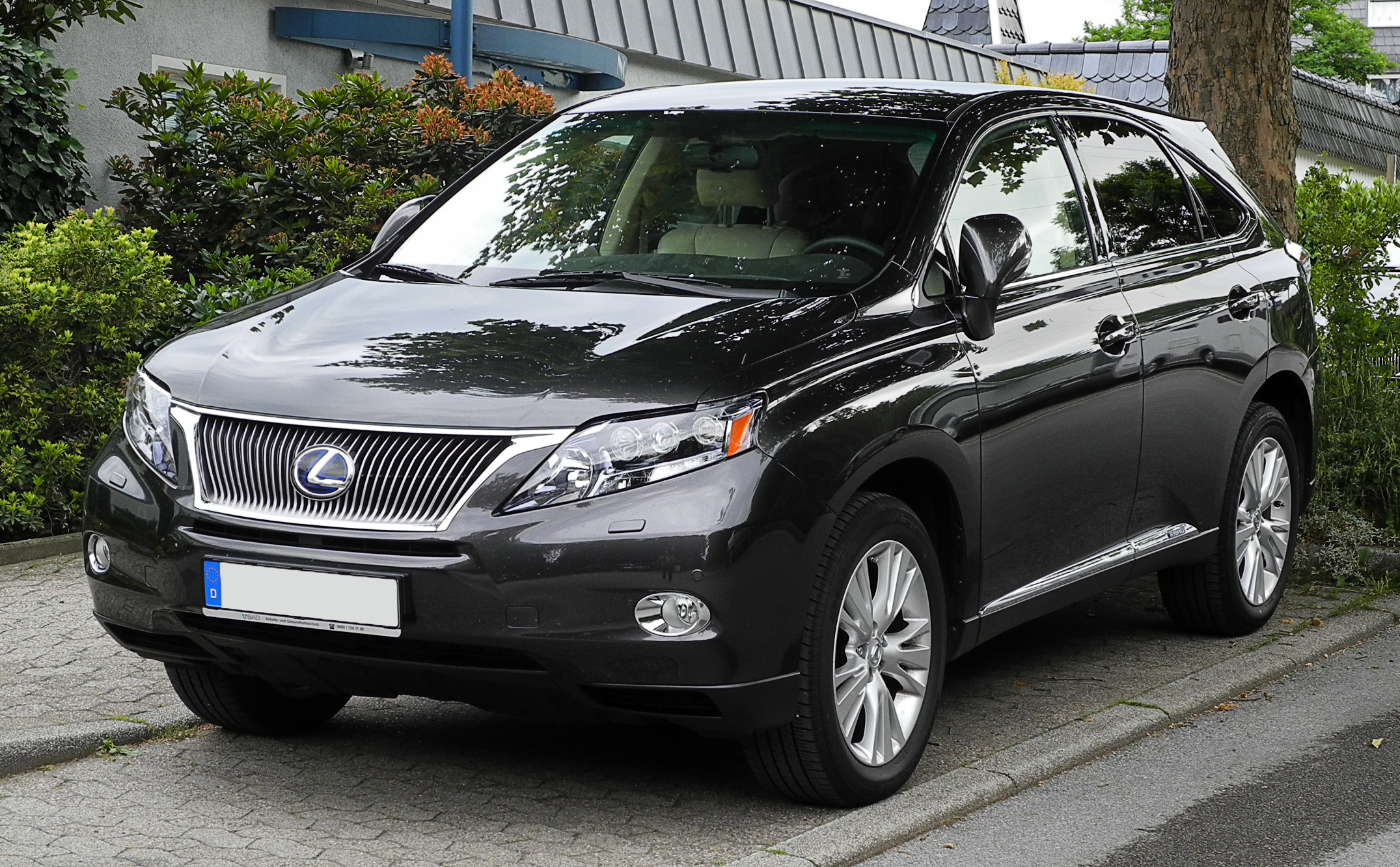 Lexus RX 450h (III)